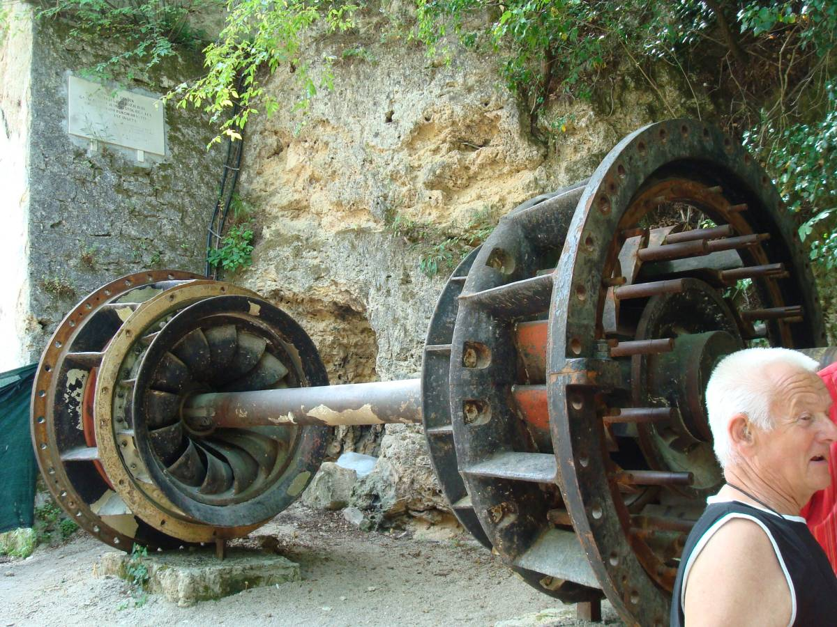 Roues hydrauliques de la première centrale hydroélectrique de Croatie sur la rivière Krka.